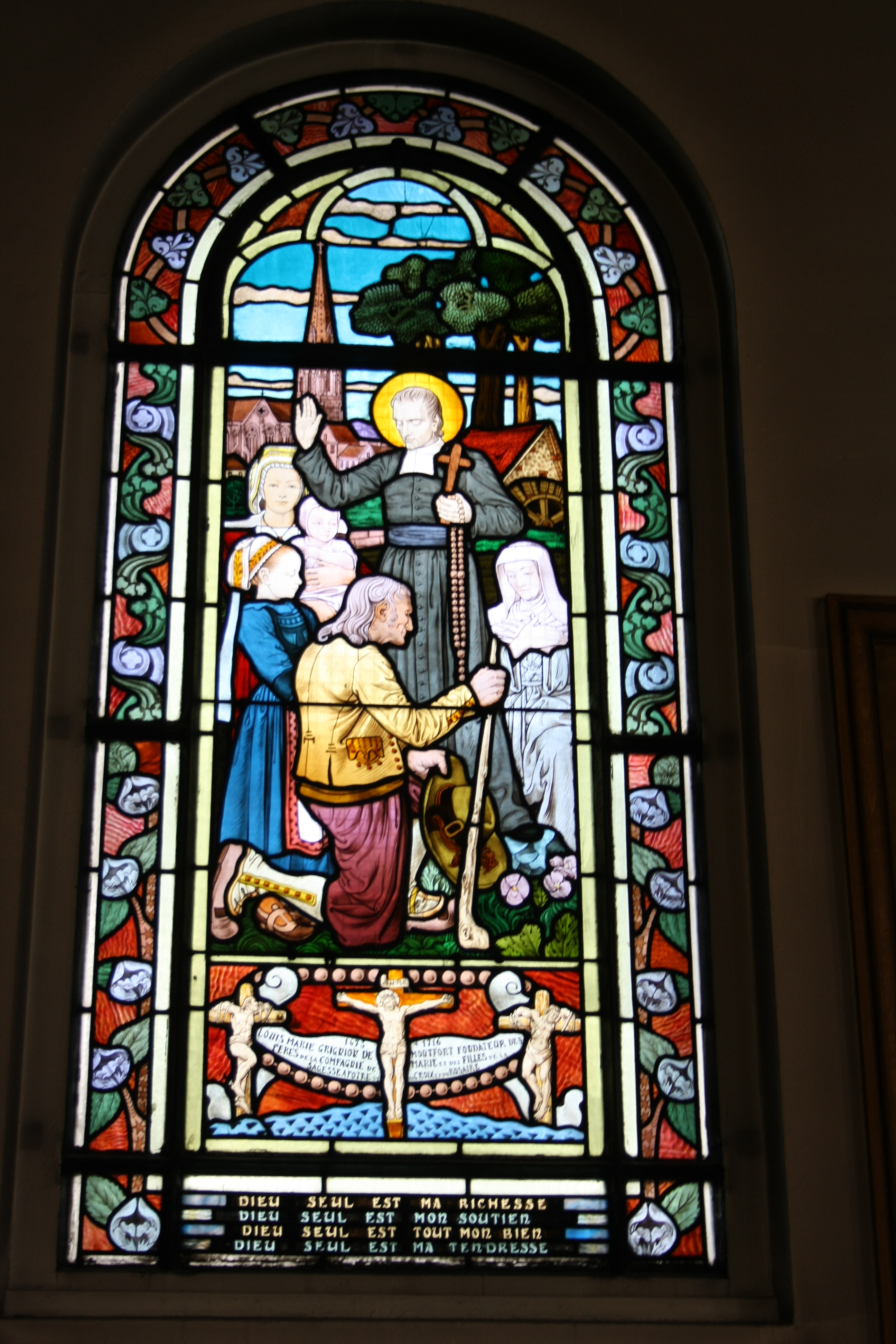 Bleiglasfenster in der Kirche Saint-Honoré d'Eylau (Avenue Raymond-Poincaré im 16. Arrondissement von Paris), Darstellung: hl. Saint Louis de Montfort (1673-1716), Hersteller des Fensters: Félix Gaudin nach einem Karton von Raphaël Freida.